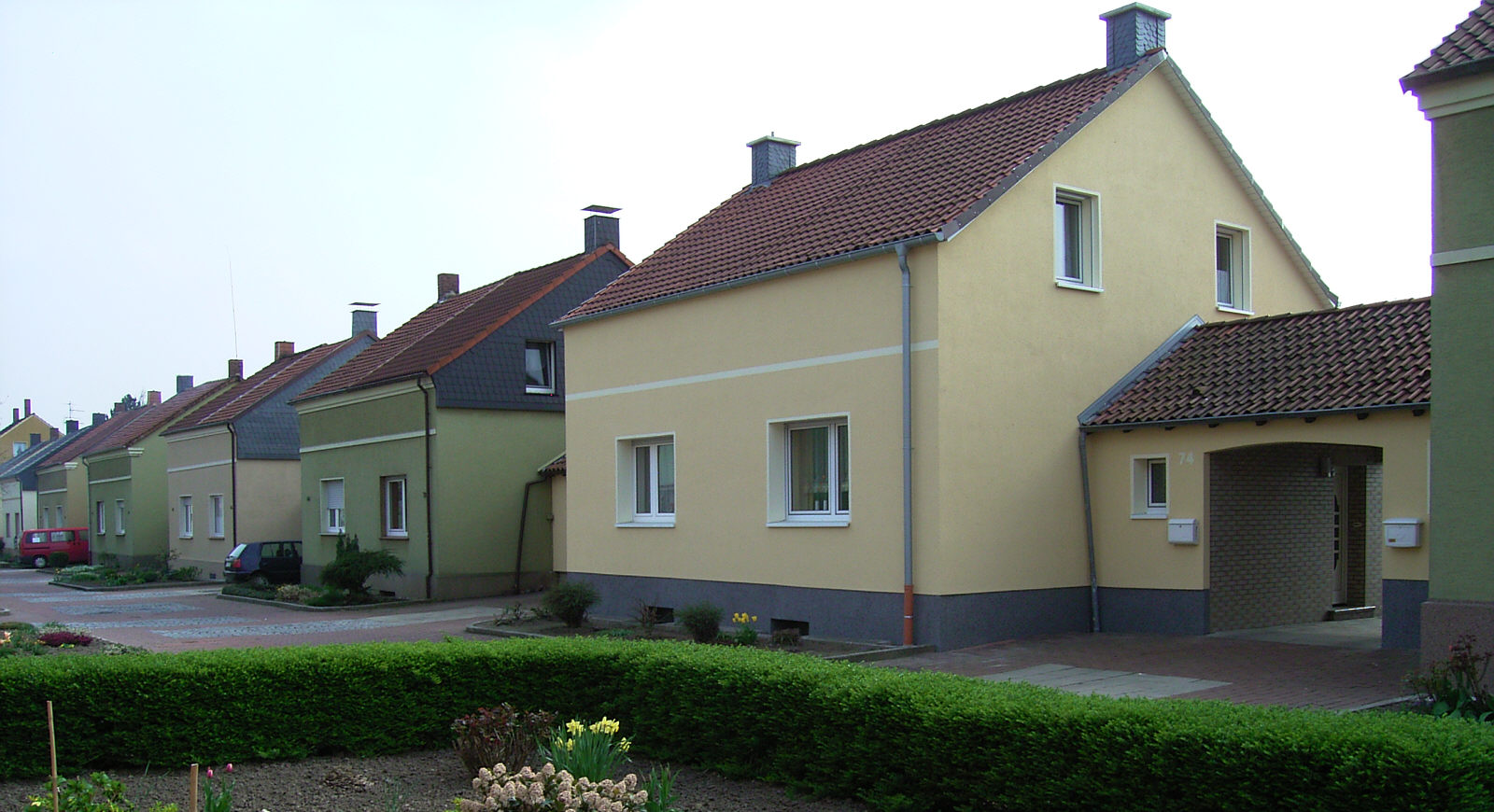 Sanierte Zechensiedlung in Königsborn (Unna) mit typischen Kniestock-Häusern